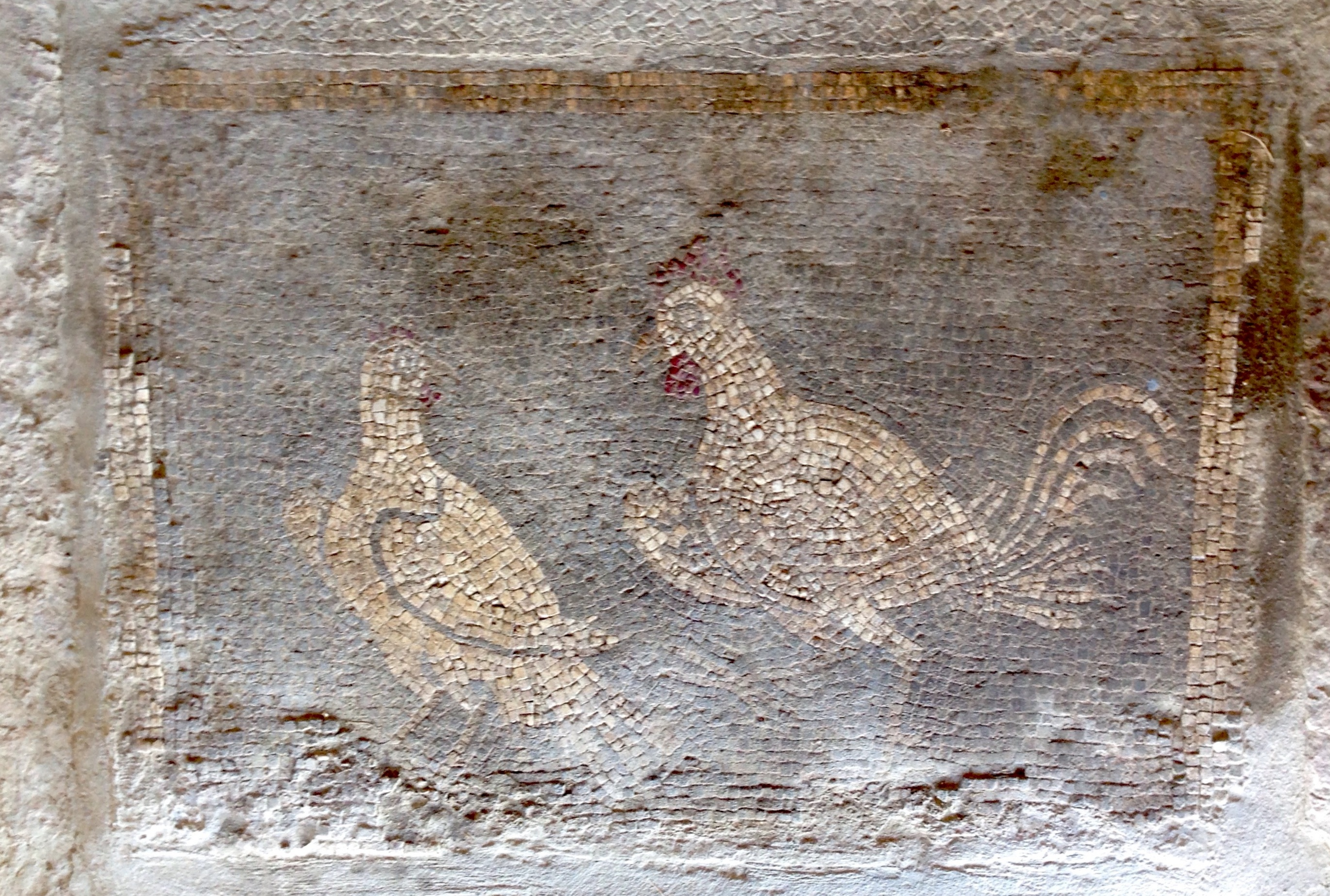 Villa romana di Cottanello . Soglia di una camera.